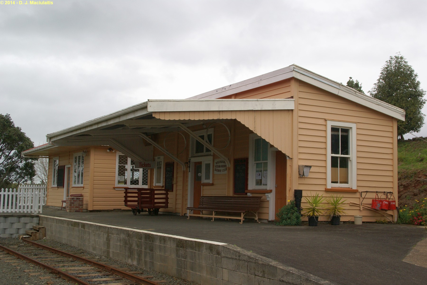 Stn_Hikurangi_Whangarei_9Octo2014